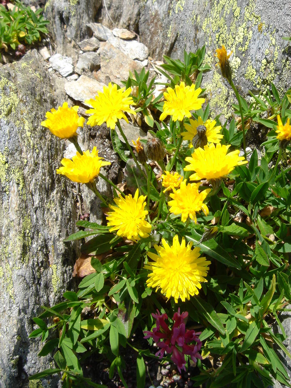 Leontodon pyrenaicus